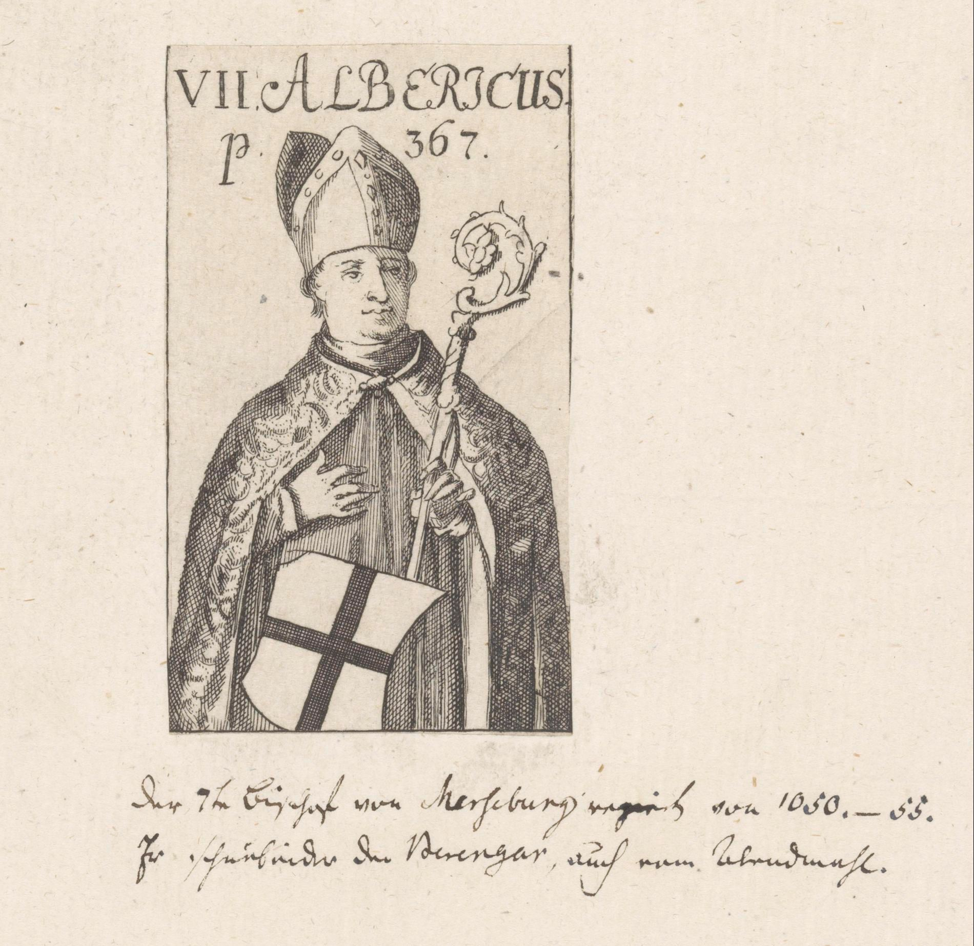 IdentificatieTitel(s): Portret van Alberik, bisschop van MerseburgObjecttype: prent boekillustratie Objectnummer: RP-P-2016-672Omschrijving: Portret van Alberik in een rechthoekige omlijsting. In de bovenmarge zijn naam. Midden boven: p. 367.VervaardigingVervaardiger: prentmaker: anoniemDatering: 1700 - 1799Fysieke kenmerken: etsMateriaal: papier Techniek: etsenAfmetingen: blad: h 75 mm (binnen plaatrand afgesneden) × b 44 mm (binnen plaatrand afgesneden)OnderwerpWie: AlberikVerwerving en rechtenVerwerving: onbekend 2016Copyright: Publiek domein